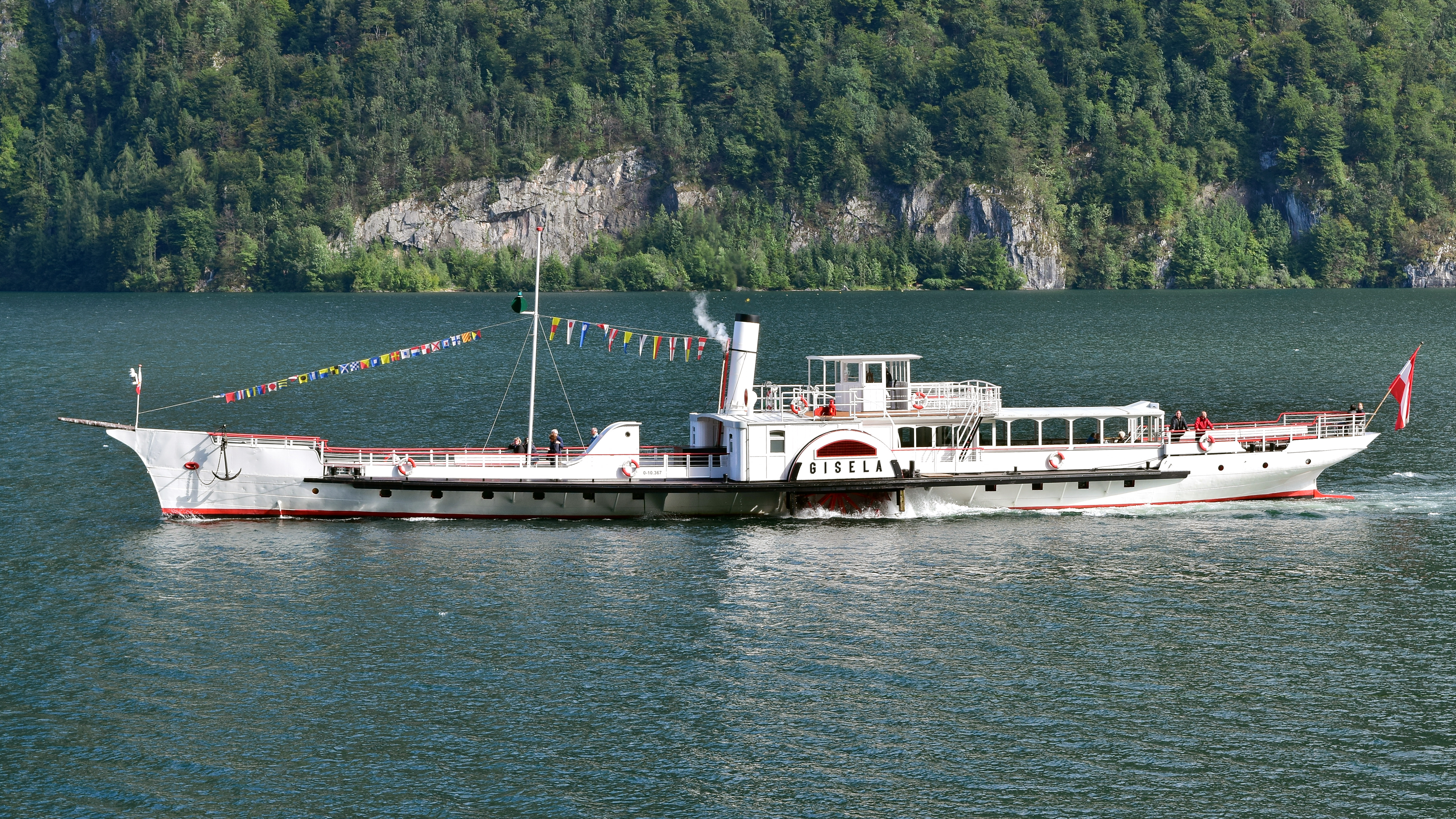 Dampfschiff "Gisela" am Traunsee Fahrtrichtung Gmunden Dieses Bild wurde anlässlich des österreichischen Tags des Denkmals 2015 in Oberösterreich eingereicht.